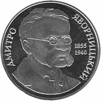 Монета Дмитро Яворницький реверс